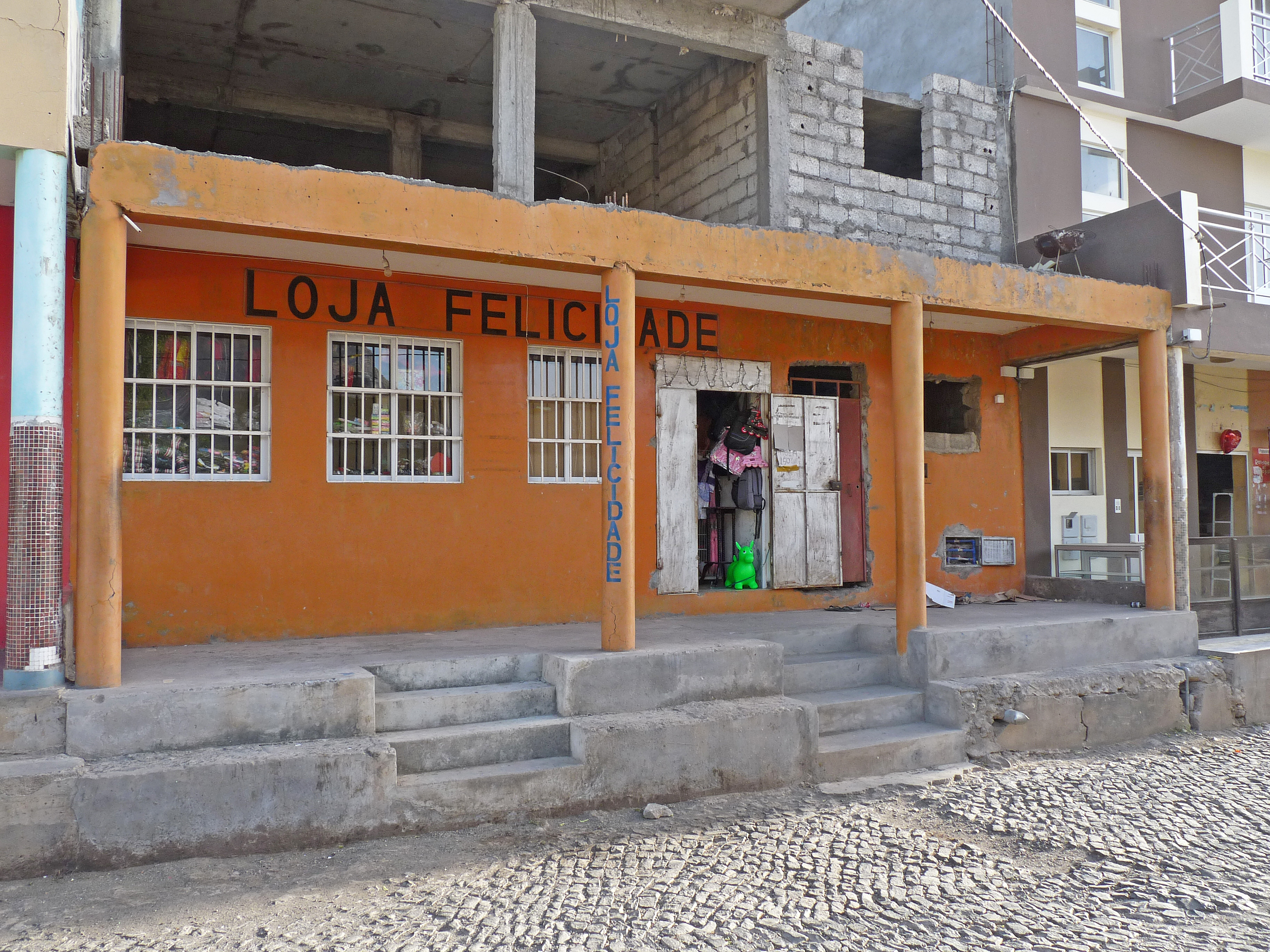 Tarrafal (île de Santiago, Cap-Vert) : magasin